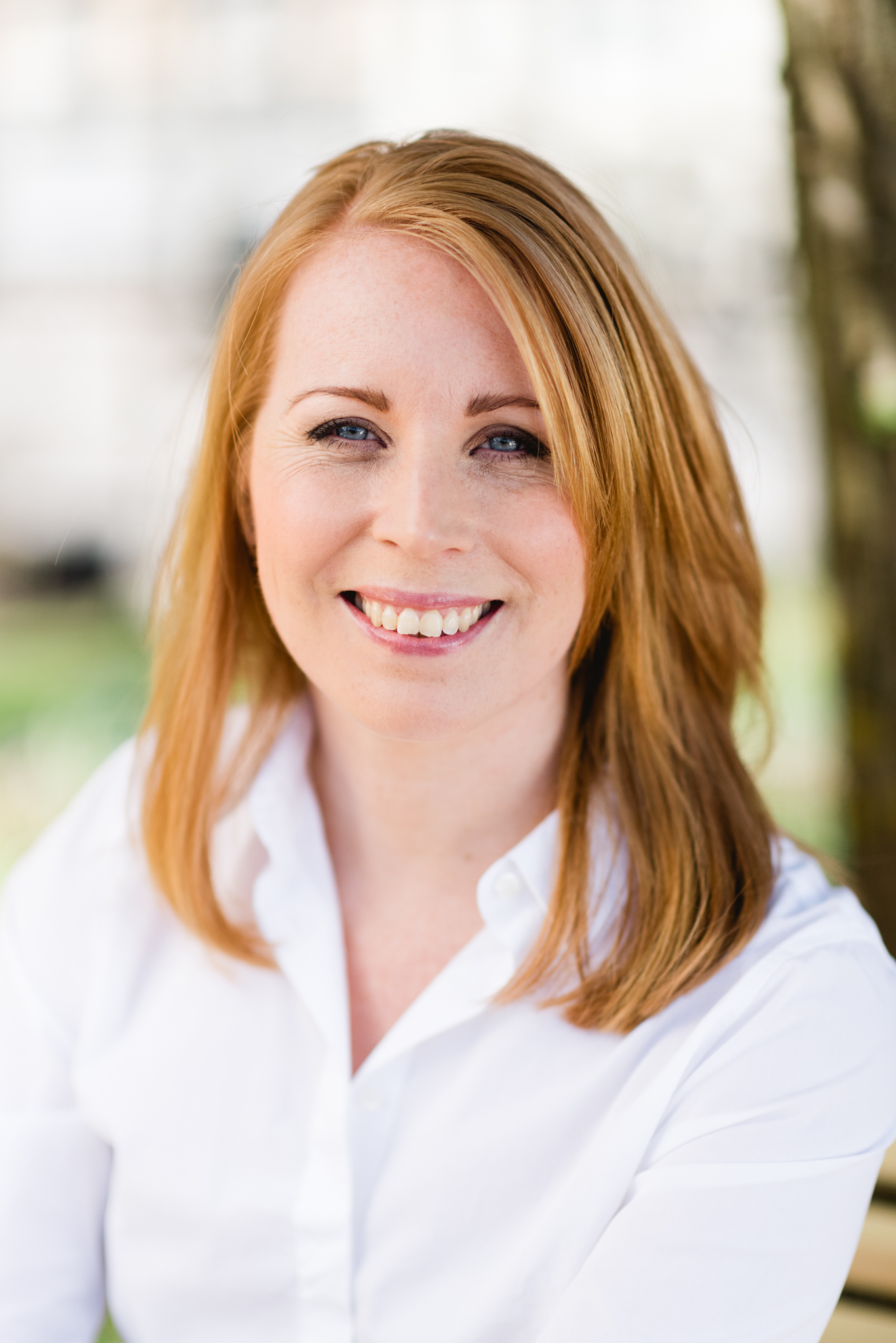 Annie Lööf in May 2017.